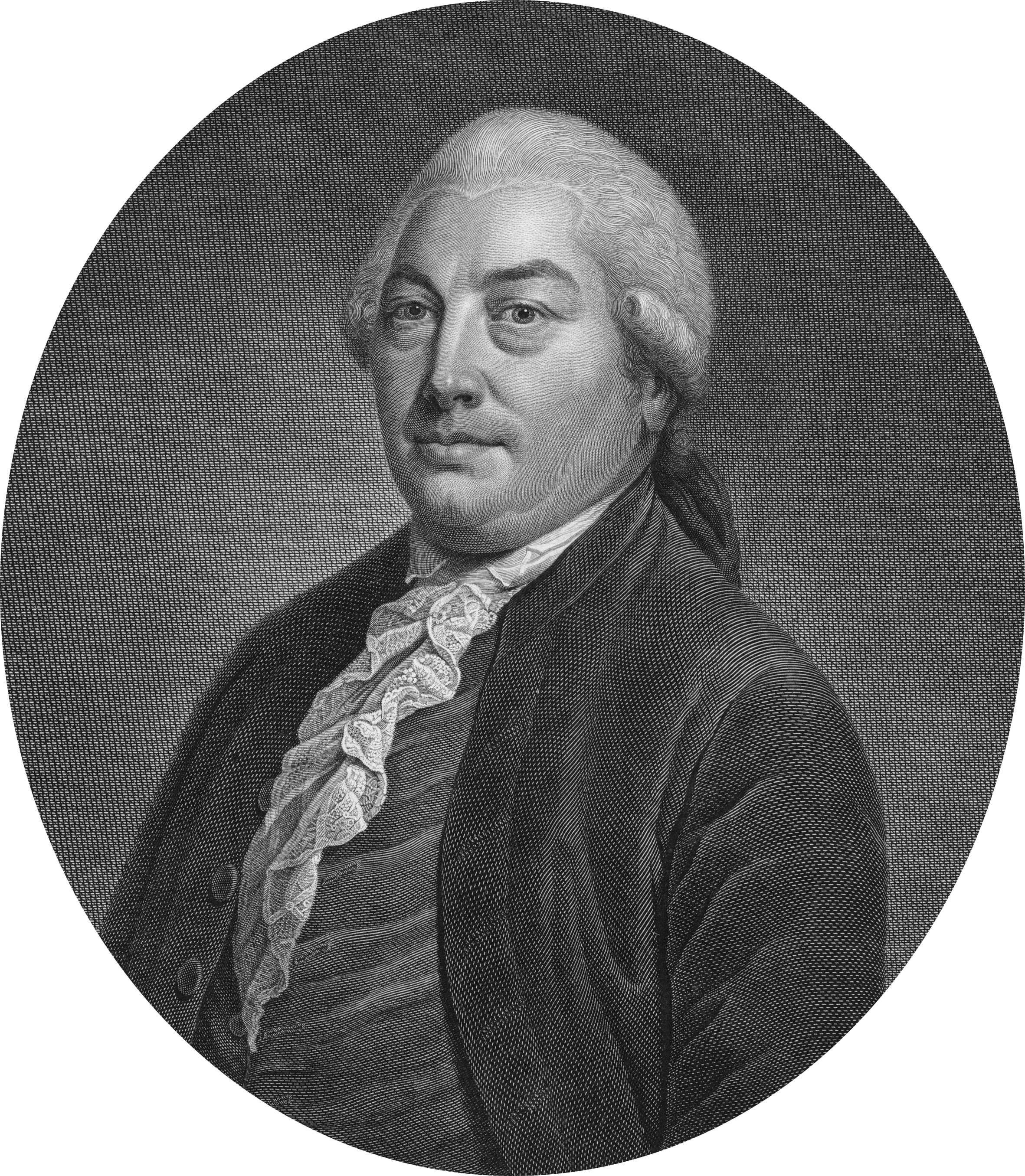 Carel Wouter Visscher (1734-1802) Pensionaris; later maire